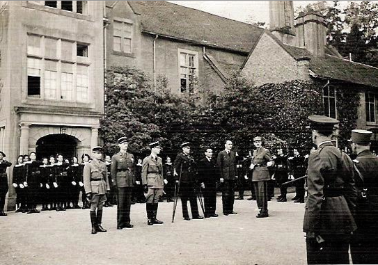 Le général De Gaulle remet la Croix de la Libération à Pierre Brossolette, Septembre 1942